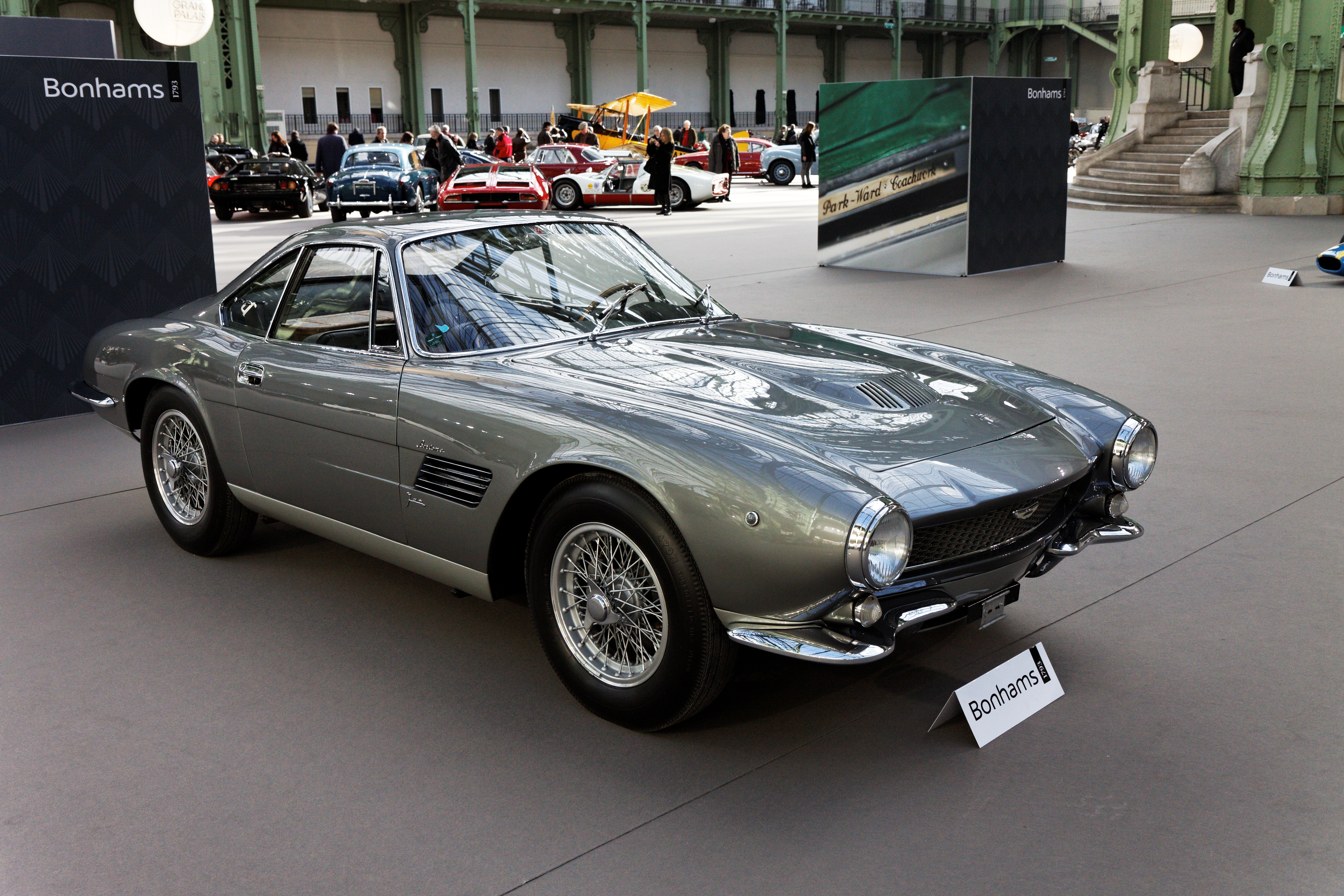 Une Aston Martin DB4GT Bertone Jet de 1960.